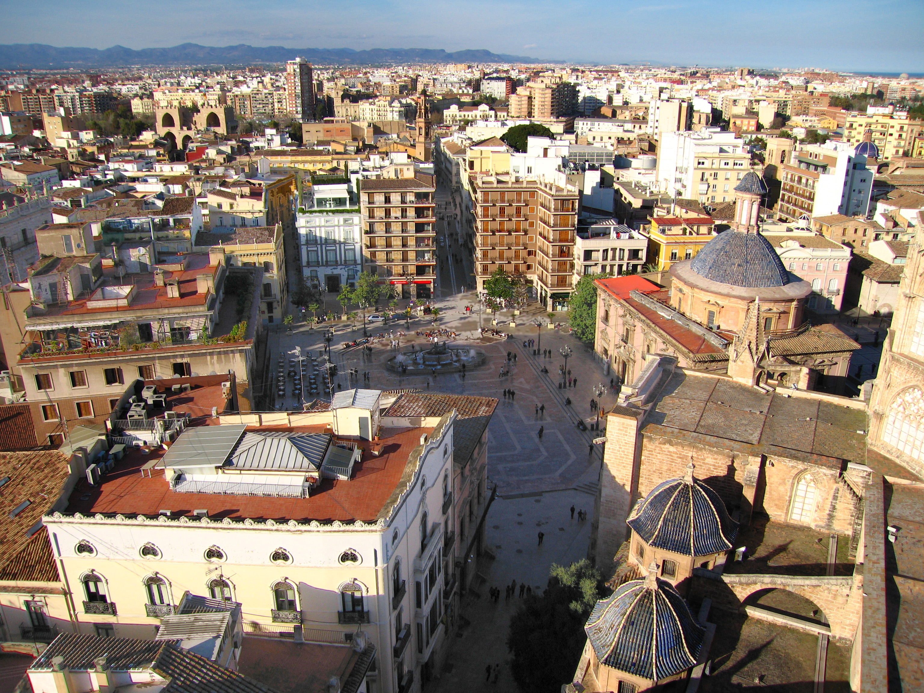 Plaça de la Marededéu de València